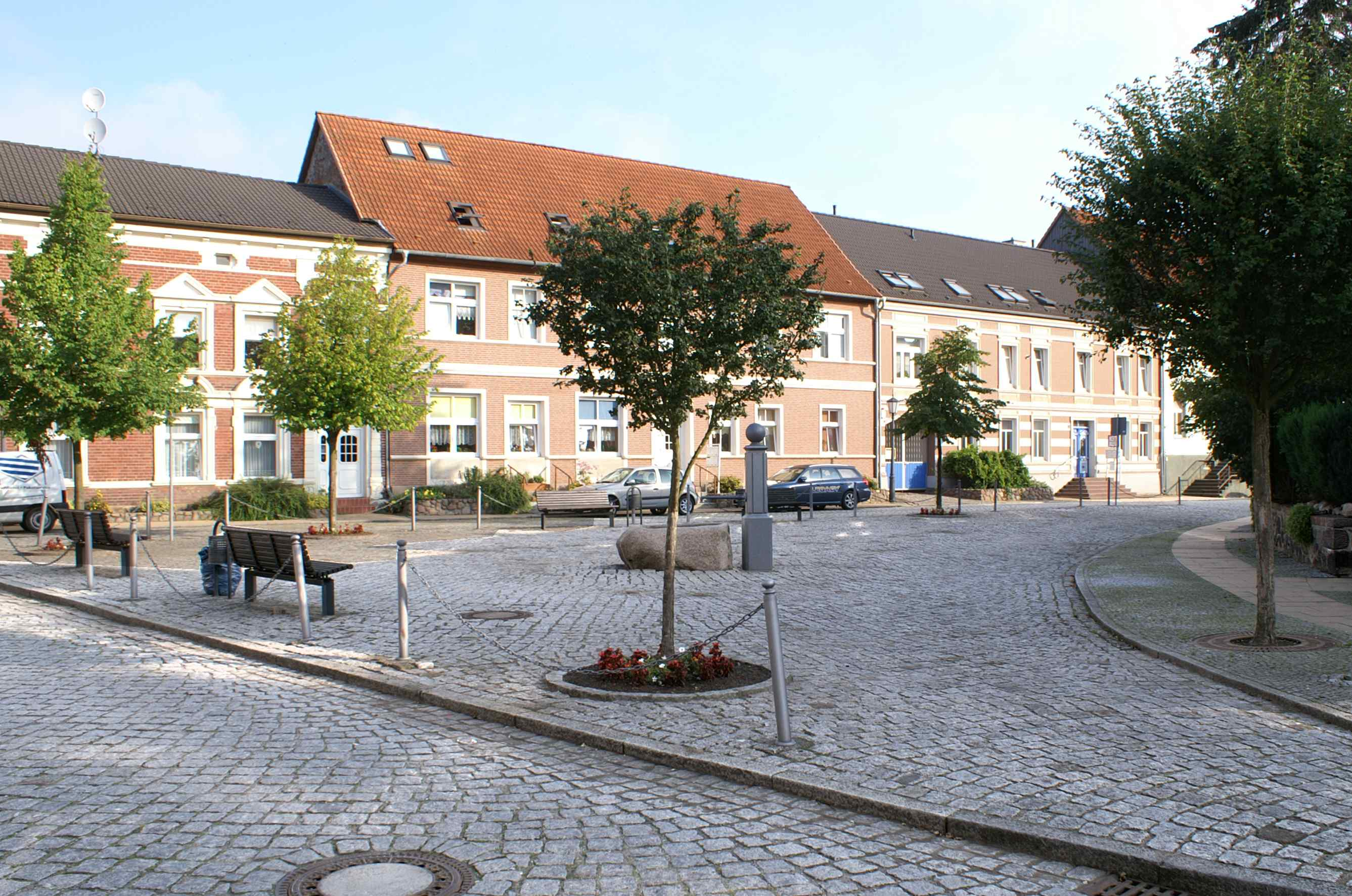 Jarmen - Landkreis Demmin - Alter Markt